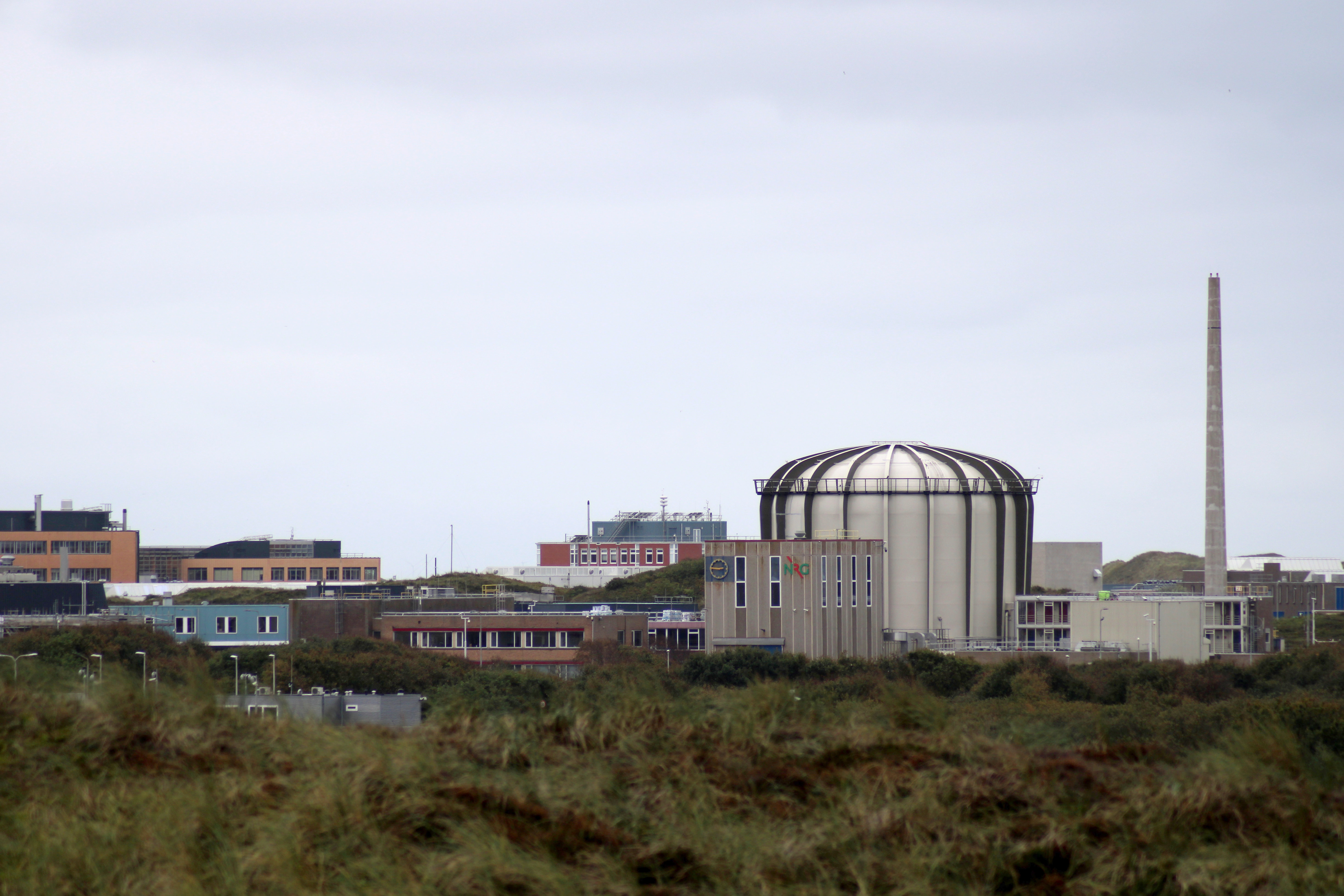 Forschungsreaktor Petten